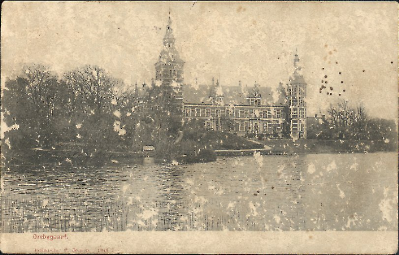 Orebygård på Lolland